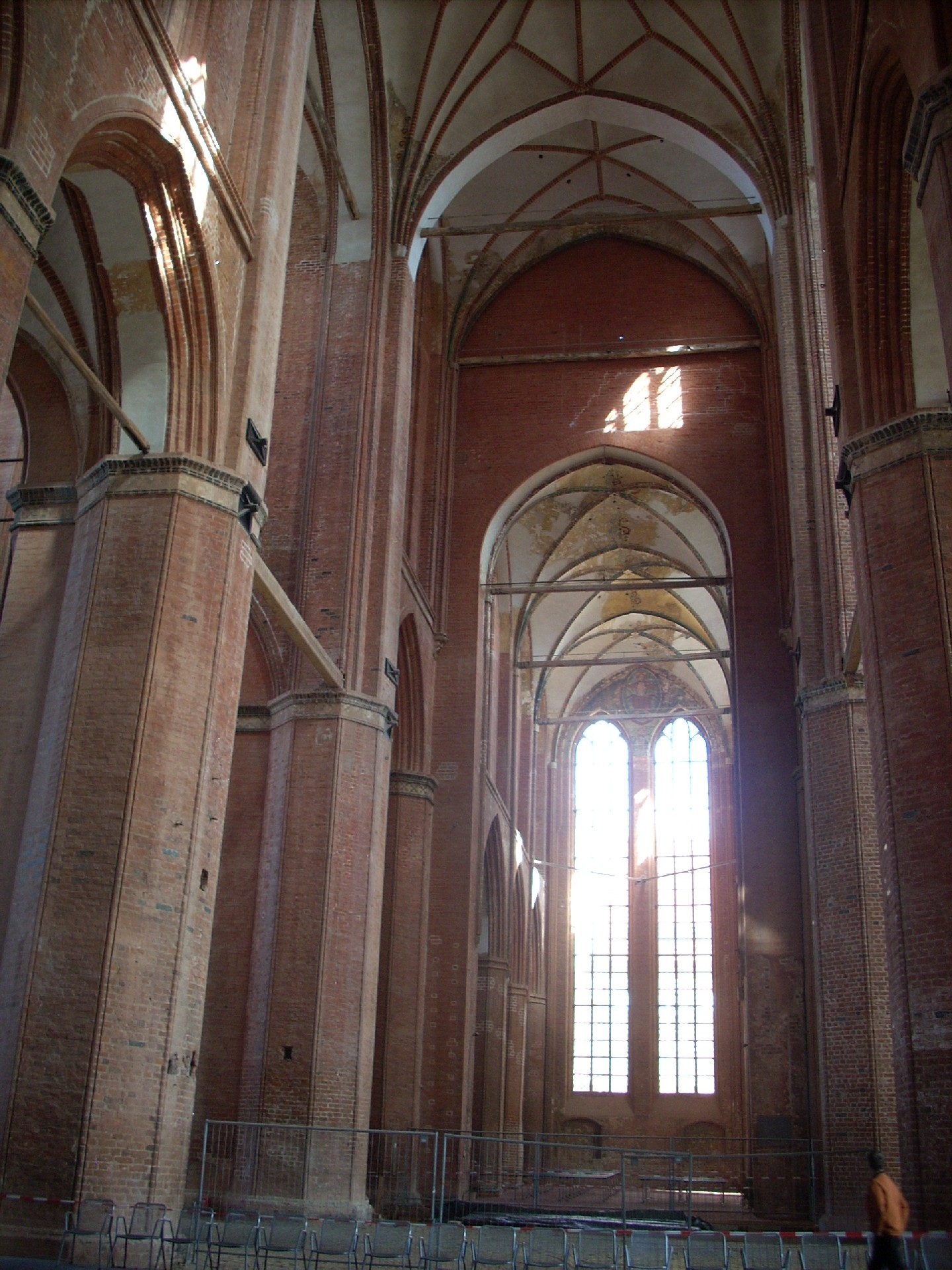 Wismar, St. Georgen, Inneres nach Osten